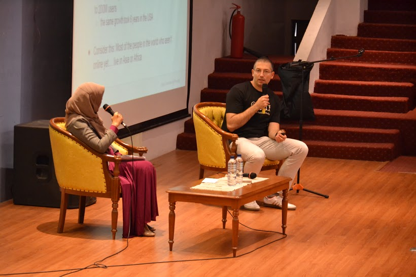 Seminar CompFest dari Google New York City